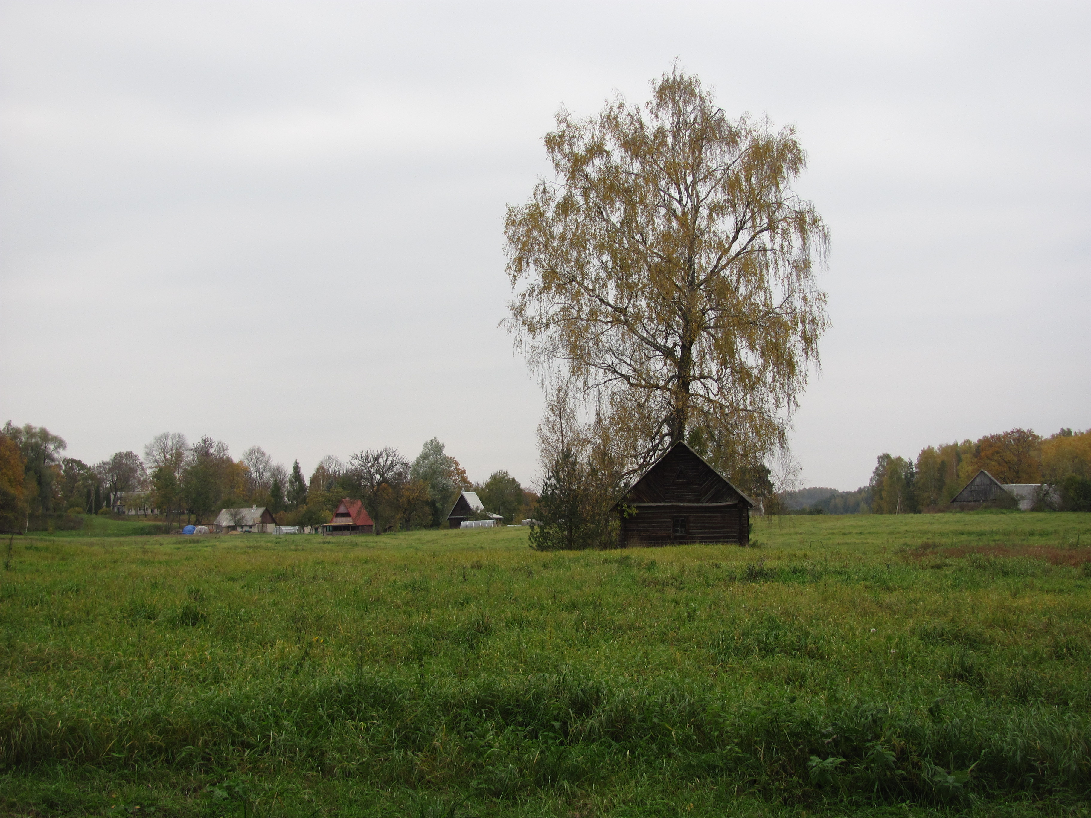 Vosgėliai 32310, Lithuania